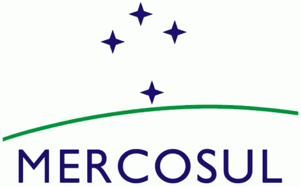 Bandeira do Mercosul em português.